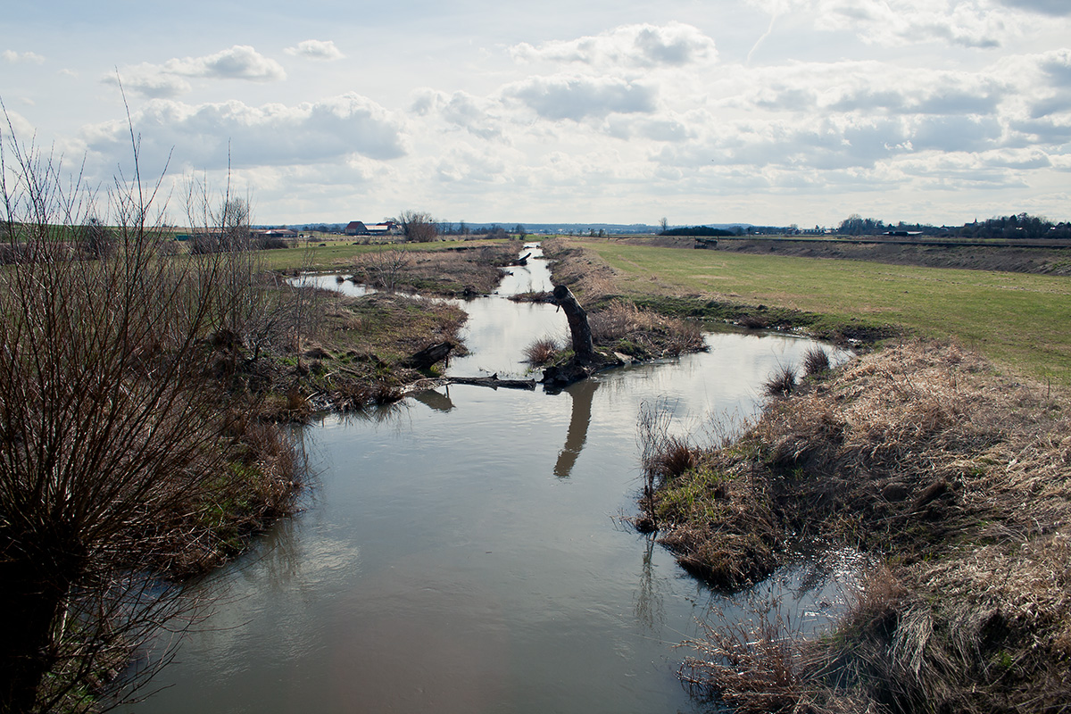 Renaturierter Lauf der Horloff